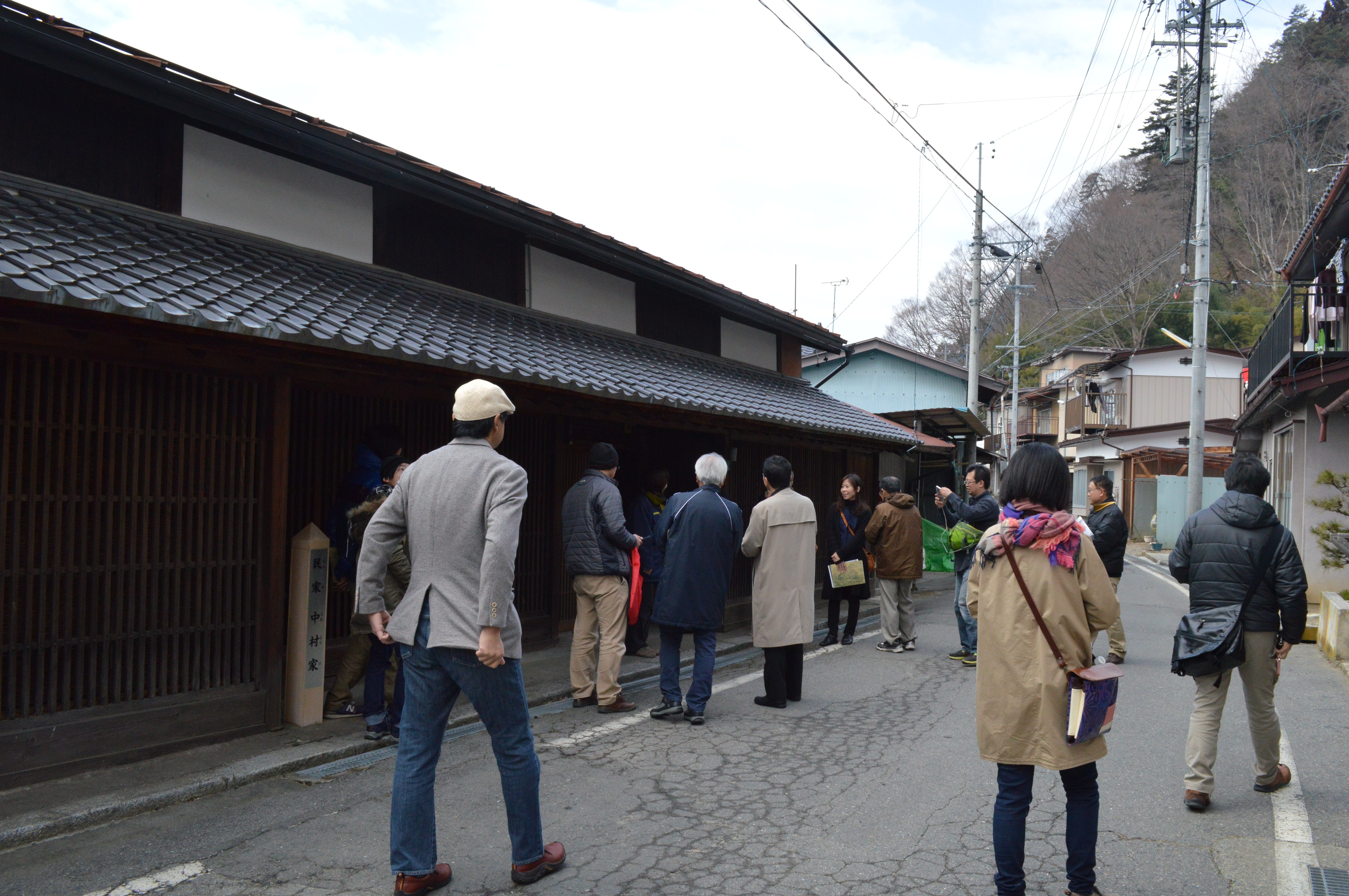 2016年3月5日に長野県伊那市高遠町で開催されたWikipedia TOWN in INA Valley x 高遠ぶらりの様子